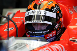 Christijan Albers, Midland F1 driver Deze foto heb ik zelf genomen tijdens een test sessie in Monza. Ik ben namelijk werkzaam als fotograaf bij . Het auteursrecht ligt dus bij mij en en ik stel hem graag beschikbaar aan de lezers van Wikipedia. Jeroen 23 okt 2006 17:54 (CEST)